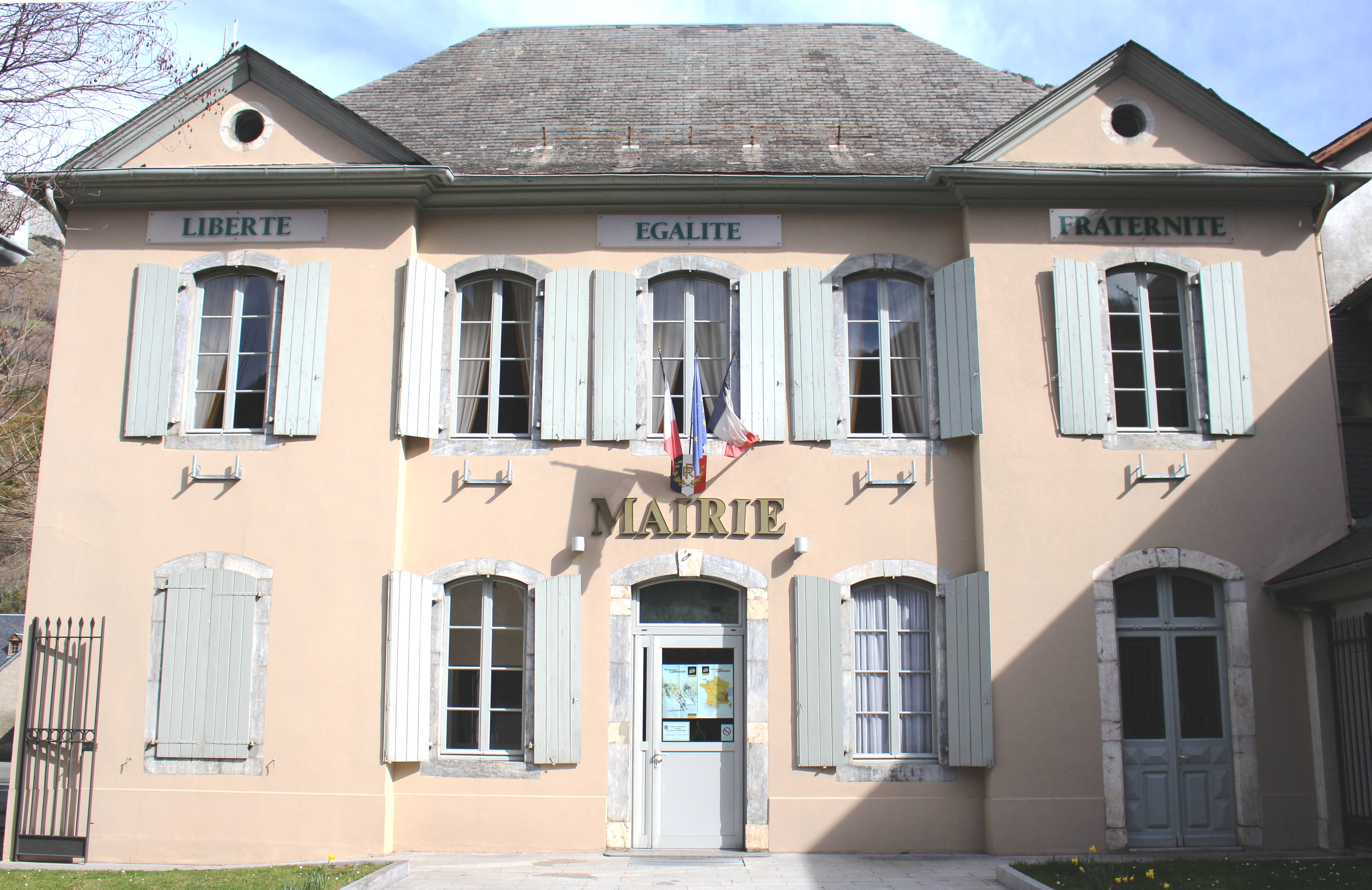 Mairie de Campan (Hautes-Pyrénées)